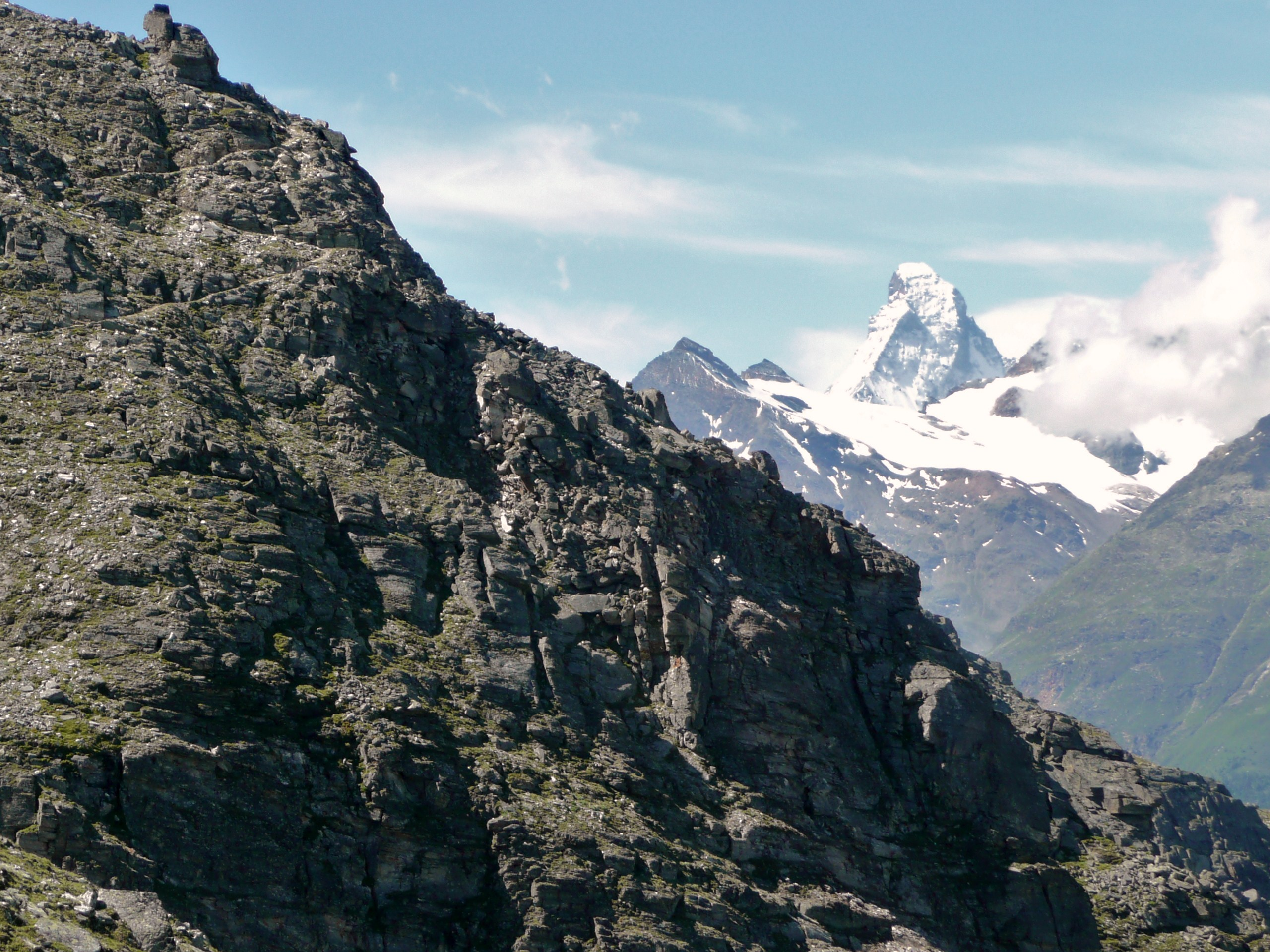 Europaweg